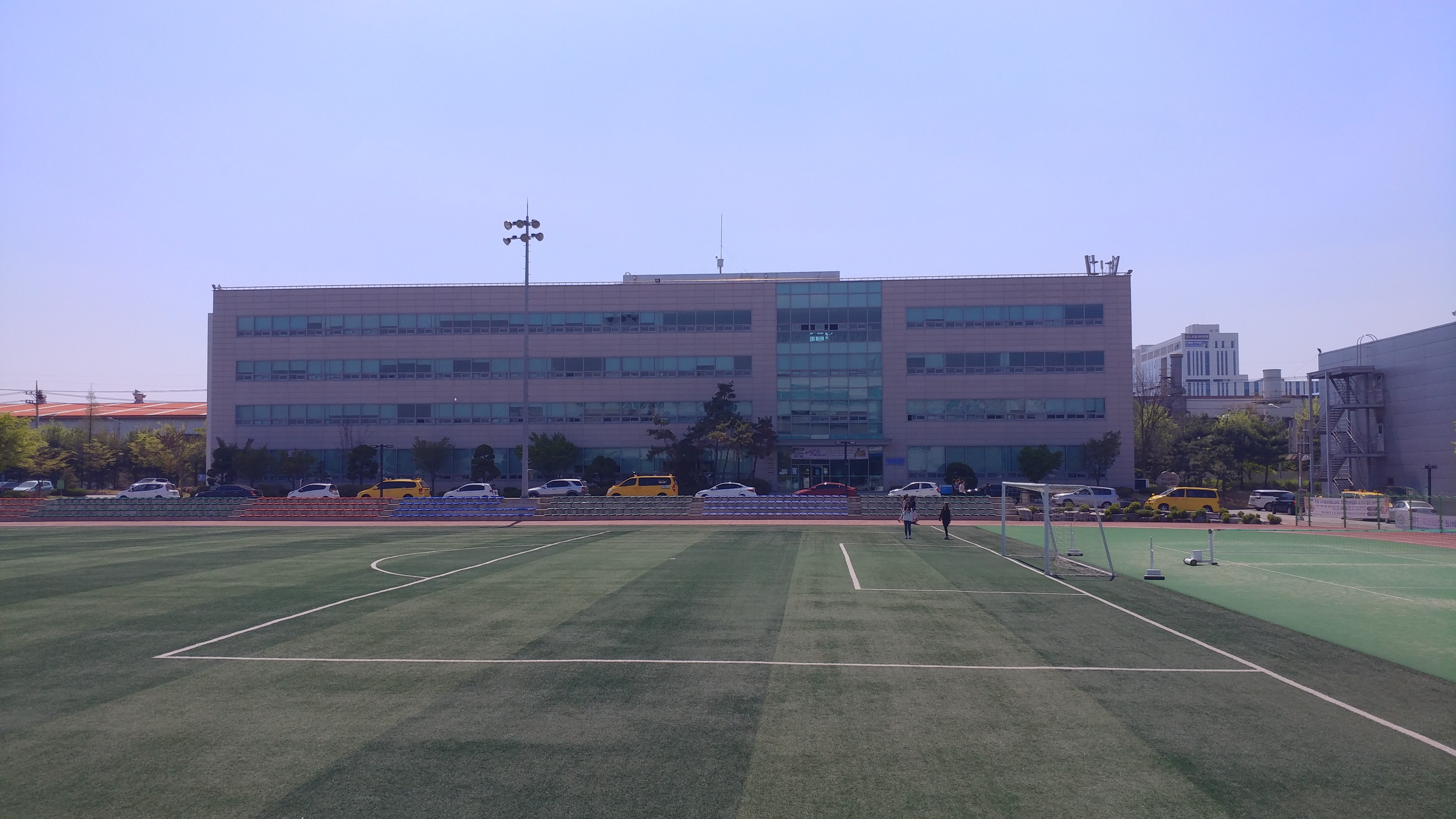 경기과학기술대학교 중소기업관